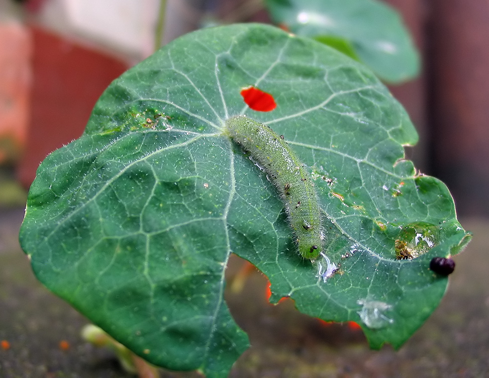 Beschreibung: Raupe des kleinen Kohlweißlings (Pieris rapae) Fotograf: Darkone, 17. August 2004